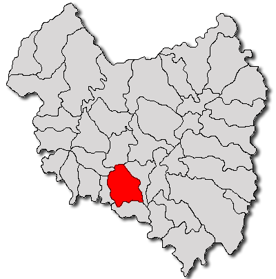 Categorie:Hărţi ale judeţului Covasna